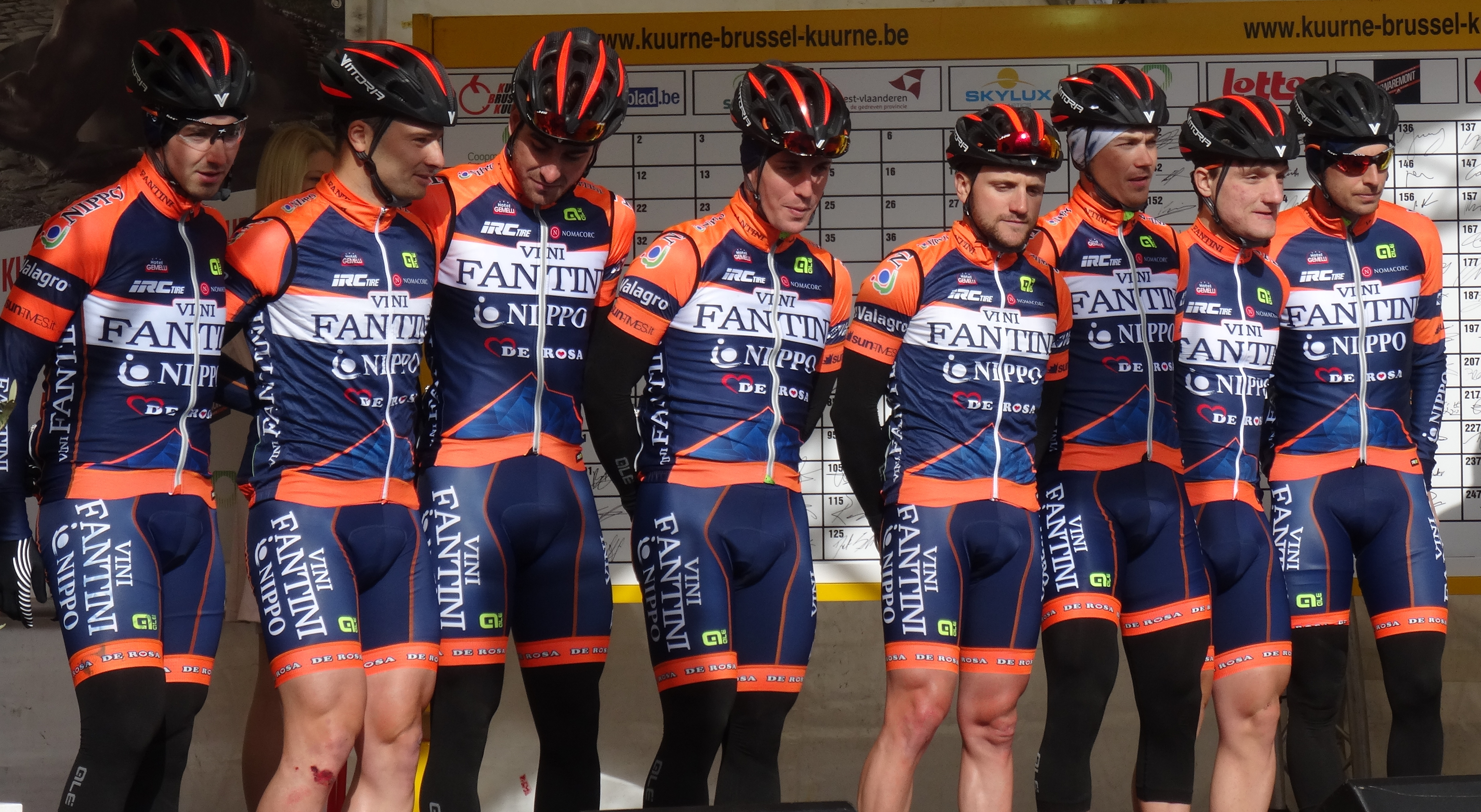 Reportage réalisé le dimanche 1er mars à l'occasion du départ et de l'arrivée de Kuurne-Bruxelles-Kuurne 2015 à Kuurne, Belgique.